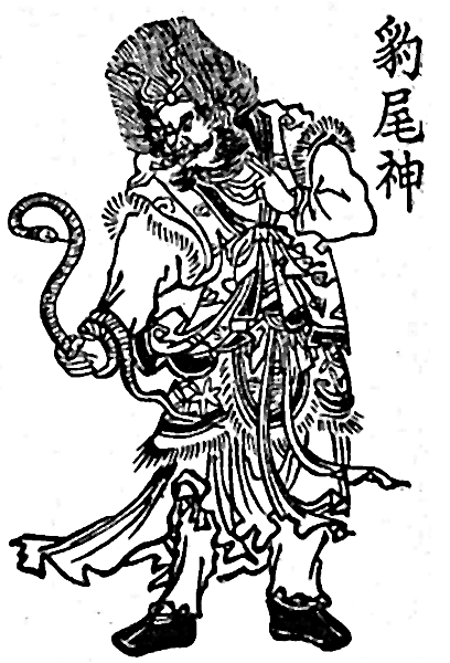 God of Hyobi. 豹尾神